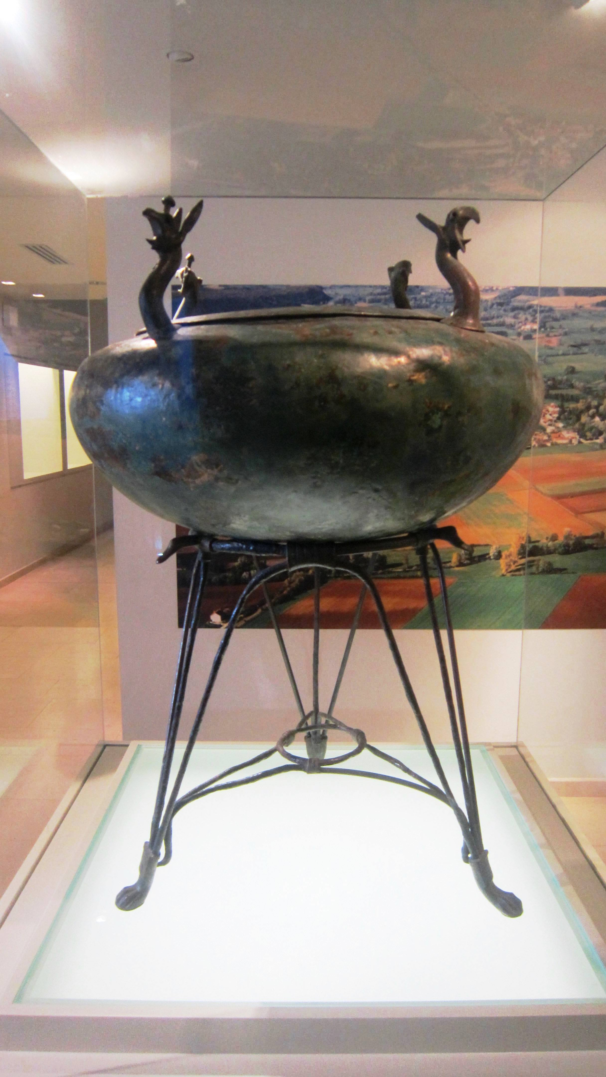 Lebes étrusque de Sainte-Colombe sur Seine (Musée du Chatillonnais)